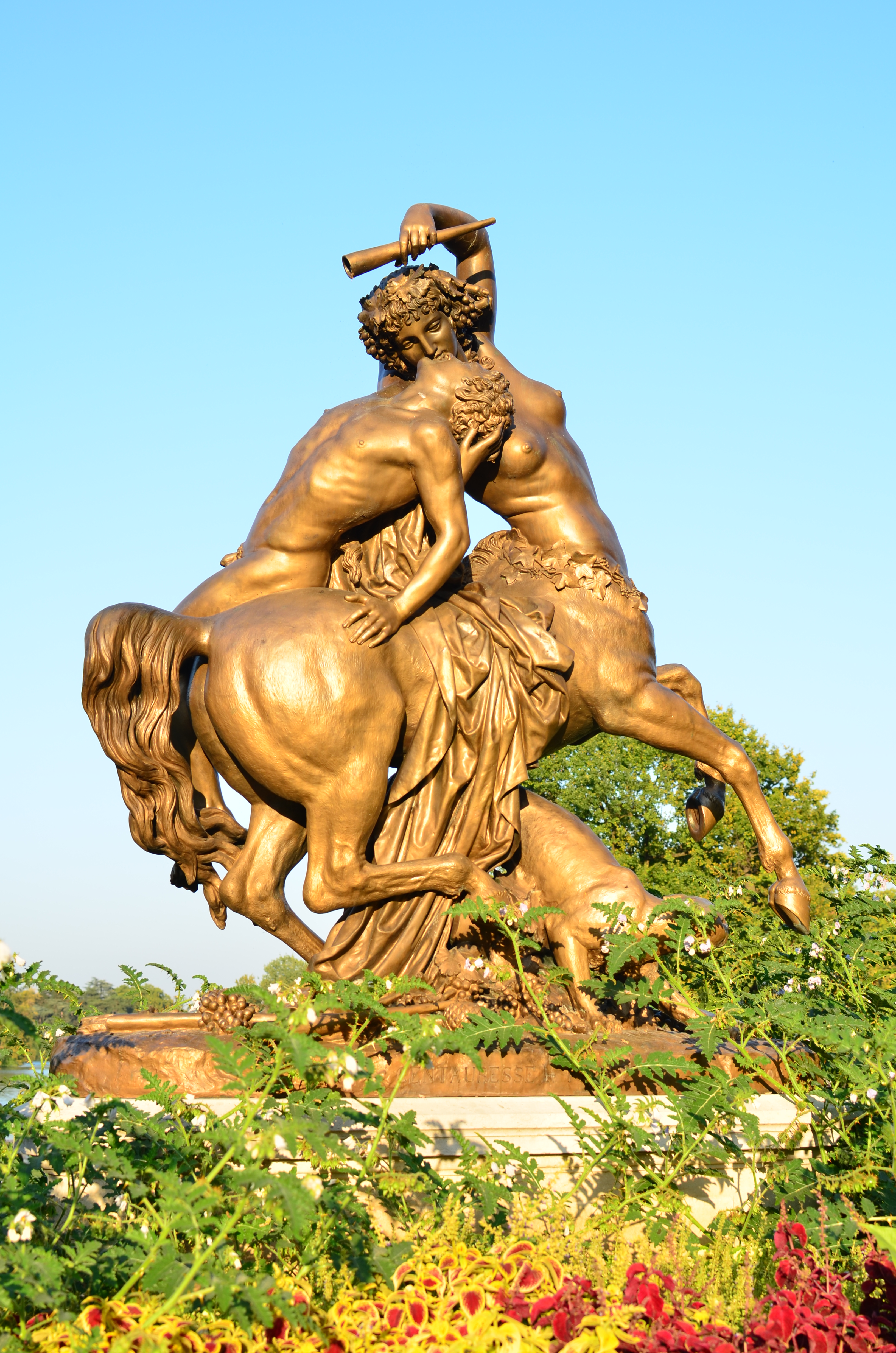 Parc de la Tête d'Or de Lyon - La Centauresse et le faune d'Augustin Courtet